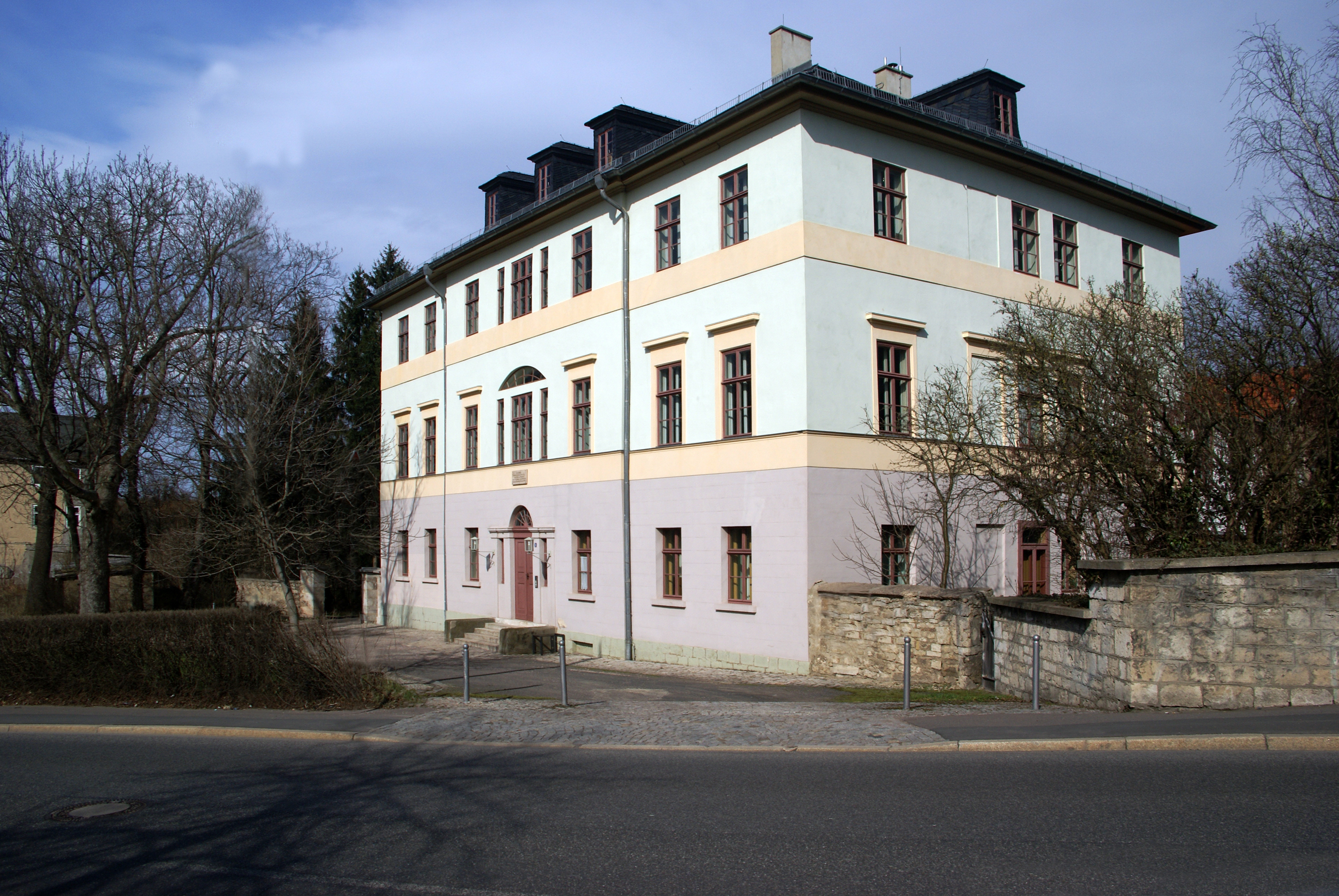 Altenburg